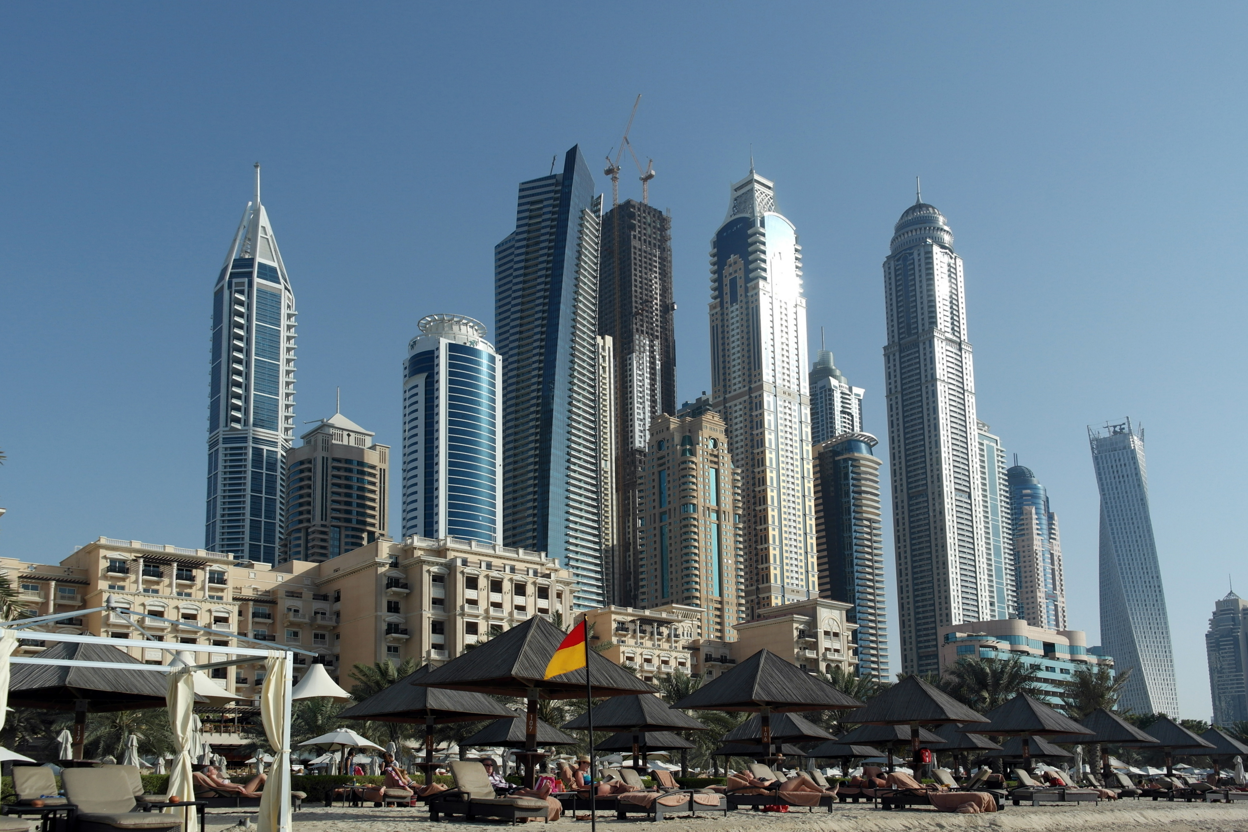 Dubai Media City, Dubai Marina - Dubai - United Arab Emirates